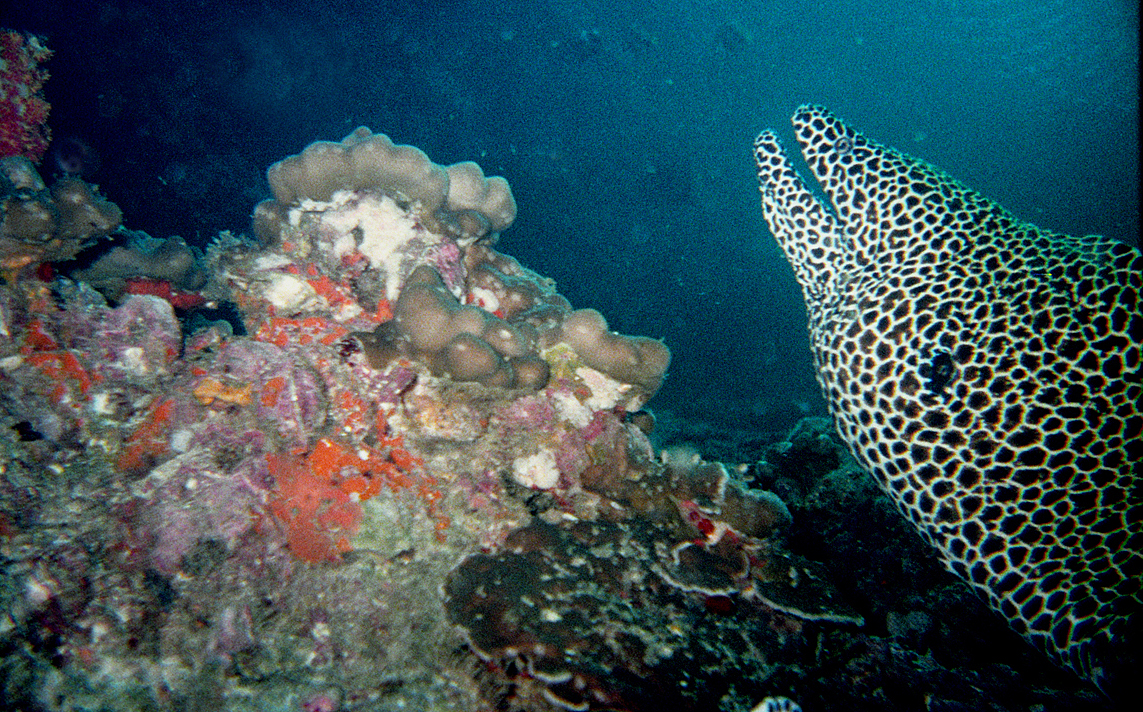 Murène (Suwadi al Batha, Oman)